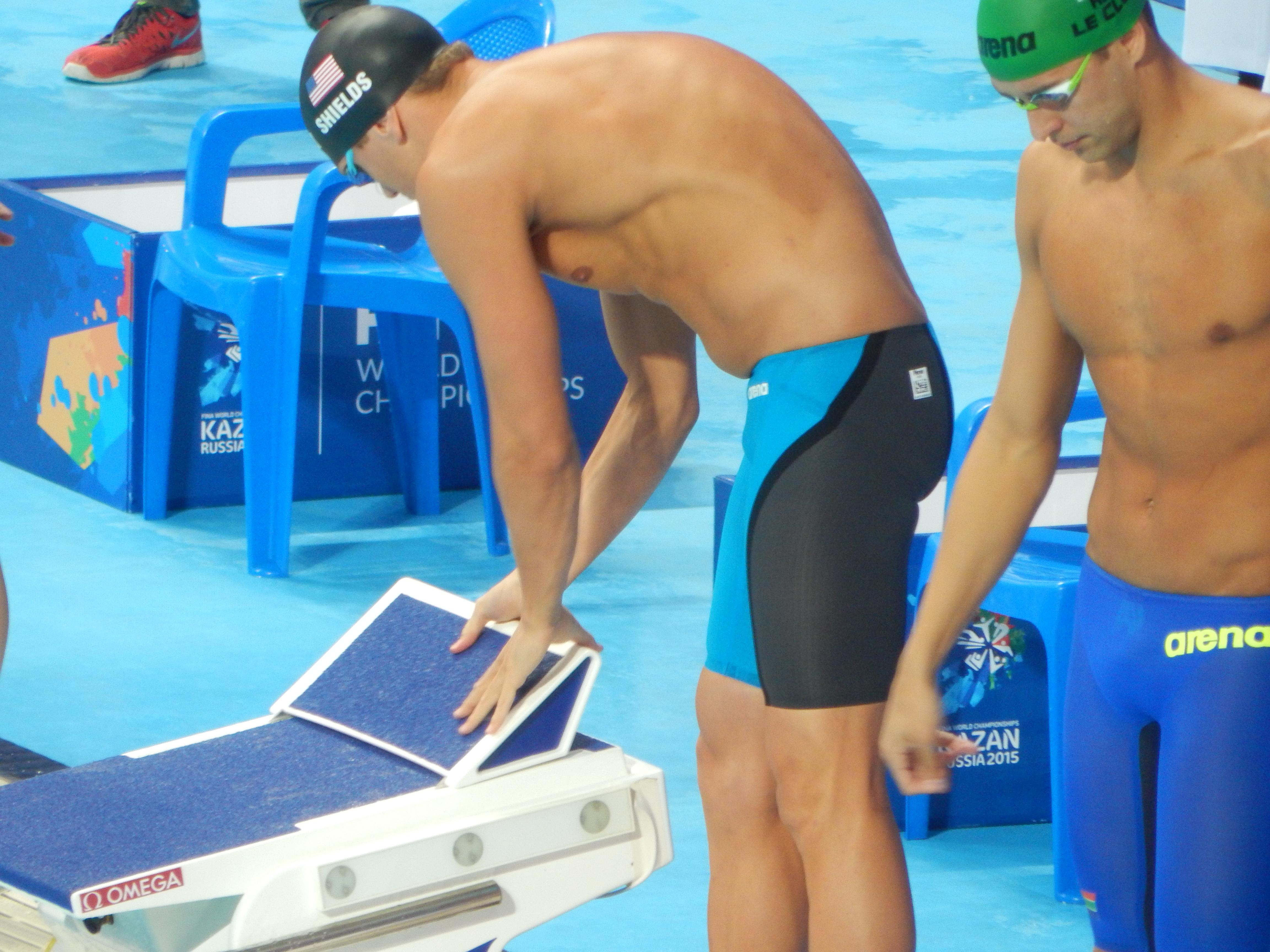 Том Шилдс в Казани на чемпионате мира, финал 100-метровки баттерфляем